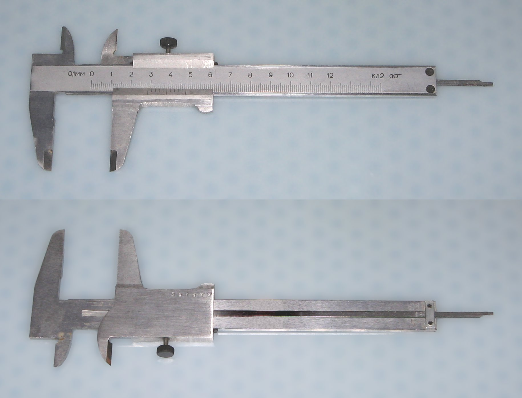 Vernierlongmezurilo kun profundmezurilo La foto estis farita de mi mem.